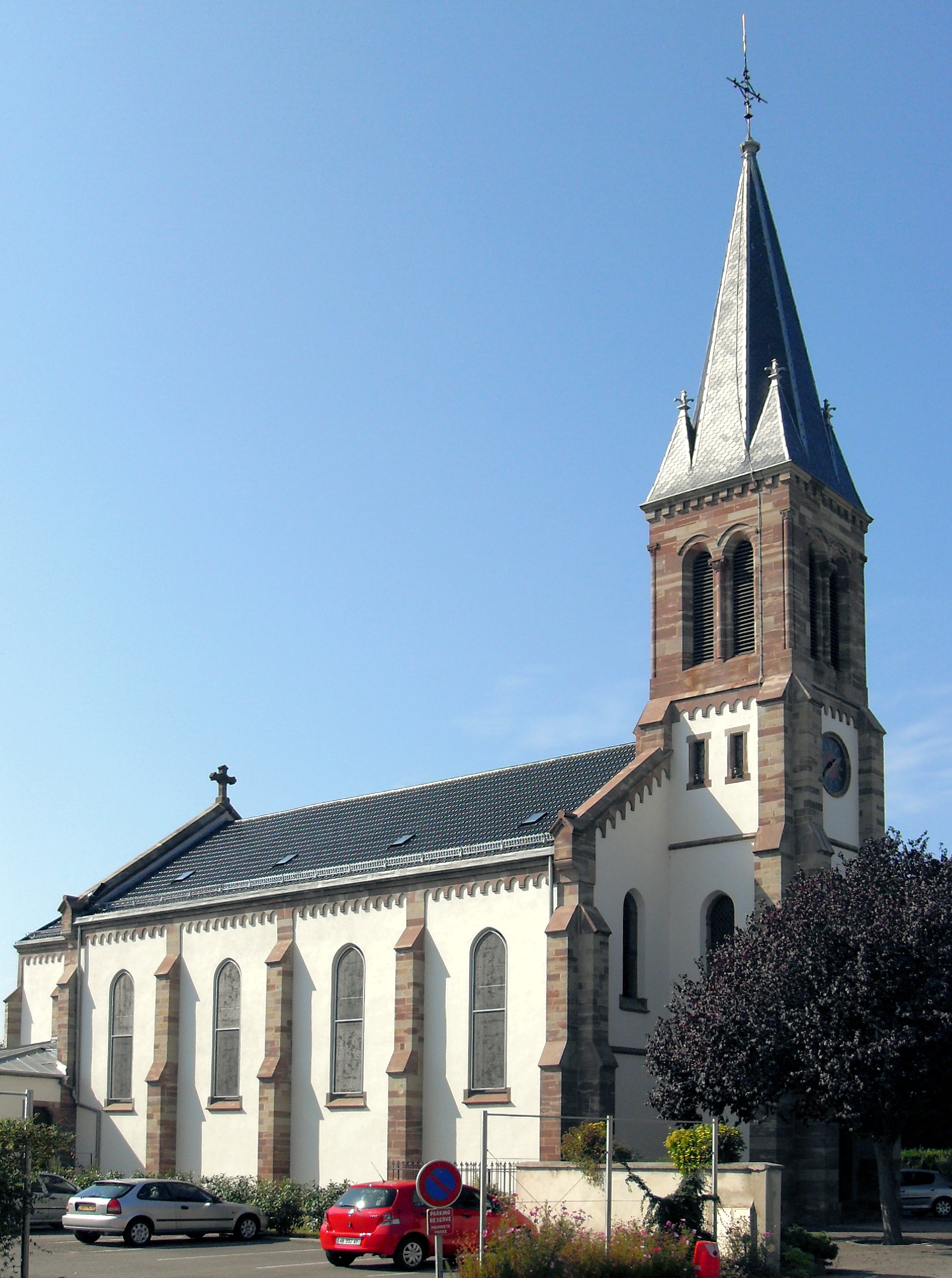 L'église Notre-Dame-de-l'Assomption à Horbourg